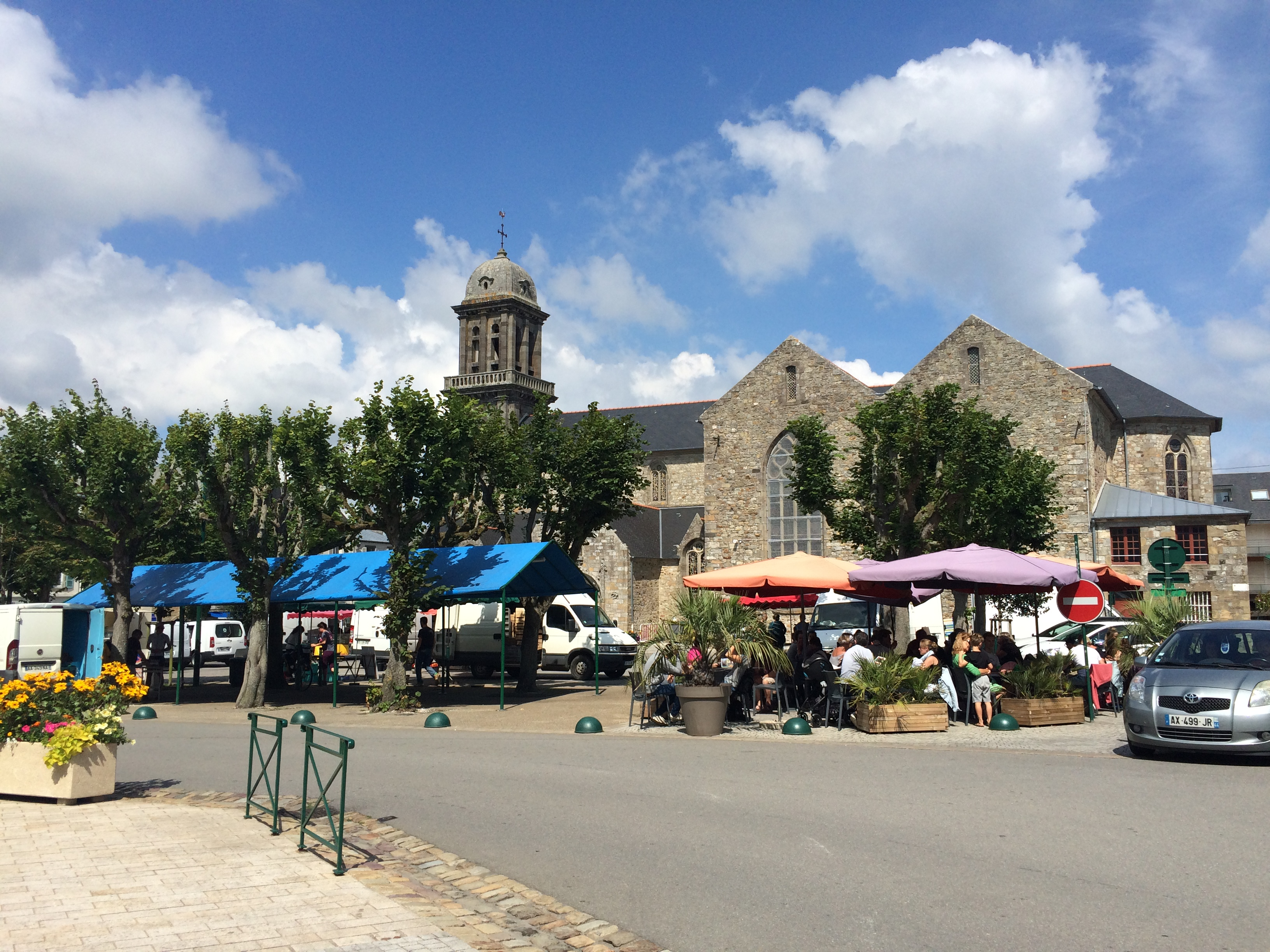 Die Kirche Saint Pierre im Zentrum von Crozon